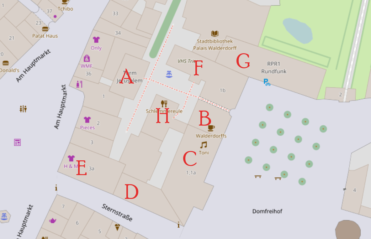 Kennzeichnung der Bauteile auf Grundlage der open Streetmap Karte: © OpenStreetMap und Mitwirkende, CC-BY-SA